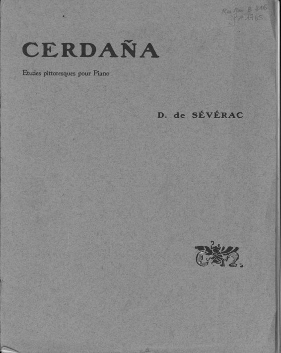 Page de titre de Cerdaña (édition mutuelle, 1911)